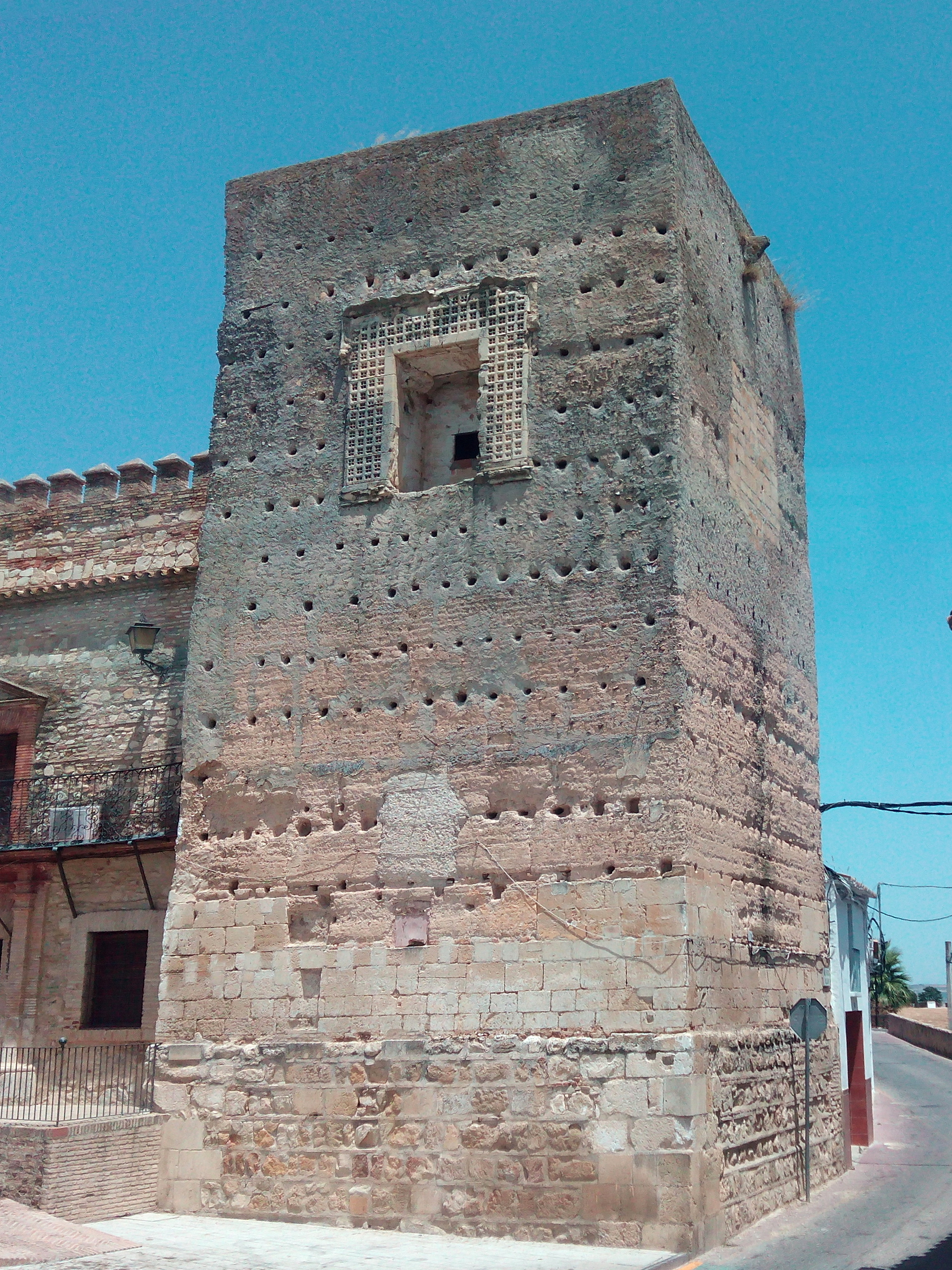 Castillo de Santaella (España).